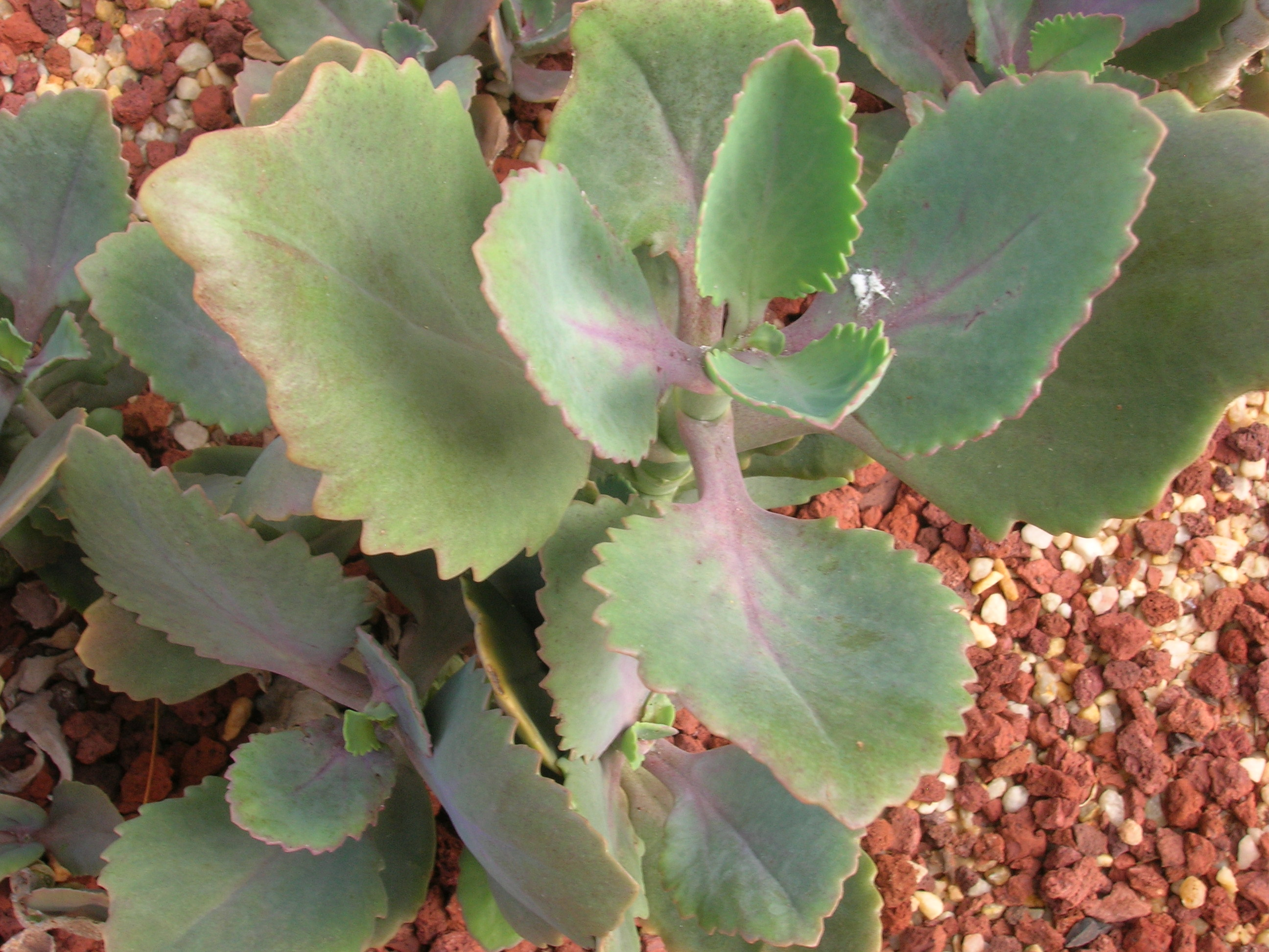 Crassulaceae Kalanchoe longiflora var. coccinea Madagascar G890285 i040707 097